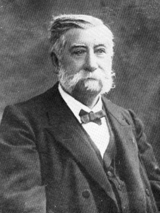 Louis Édouard Bureau (25 May 1830 in Nantes – 14 December 1918 in Paris)